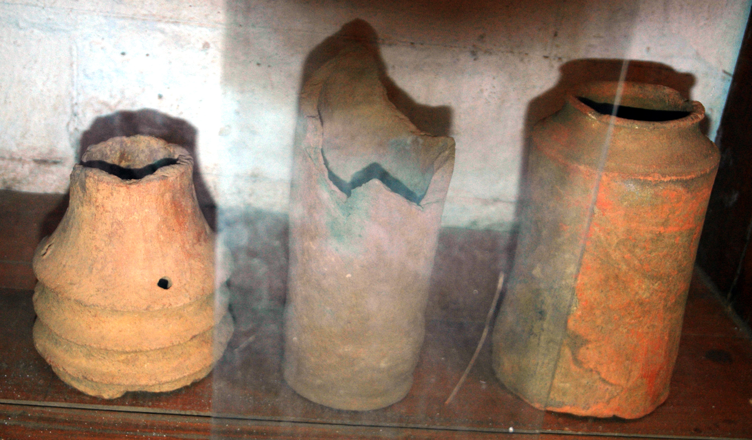 சுடுமண் குழாய்கள் - தொல் பொருட்காட்சிச்சாலை, யாழ்ப்பாணம்